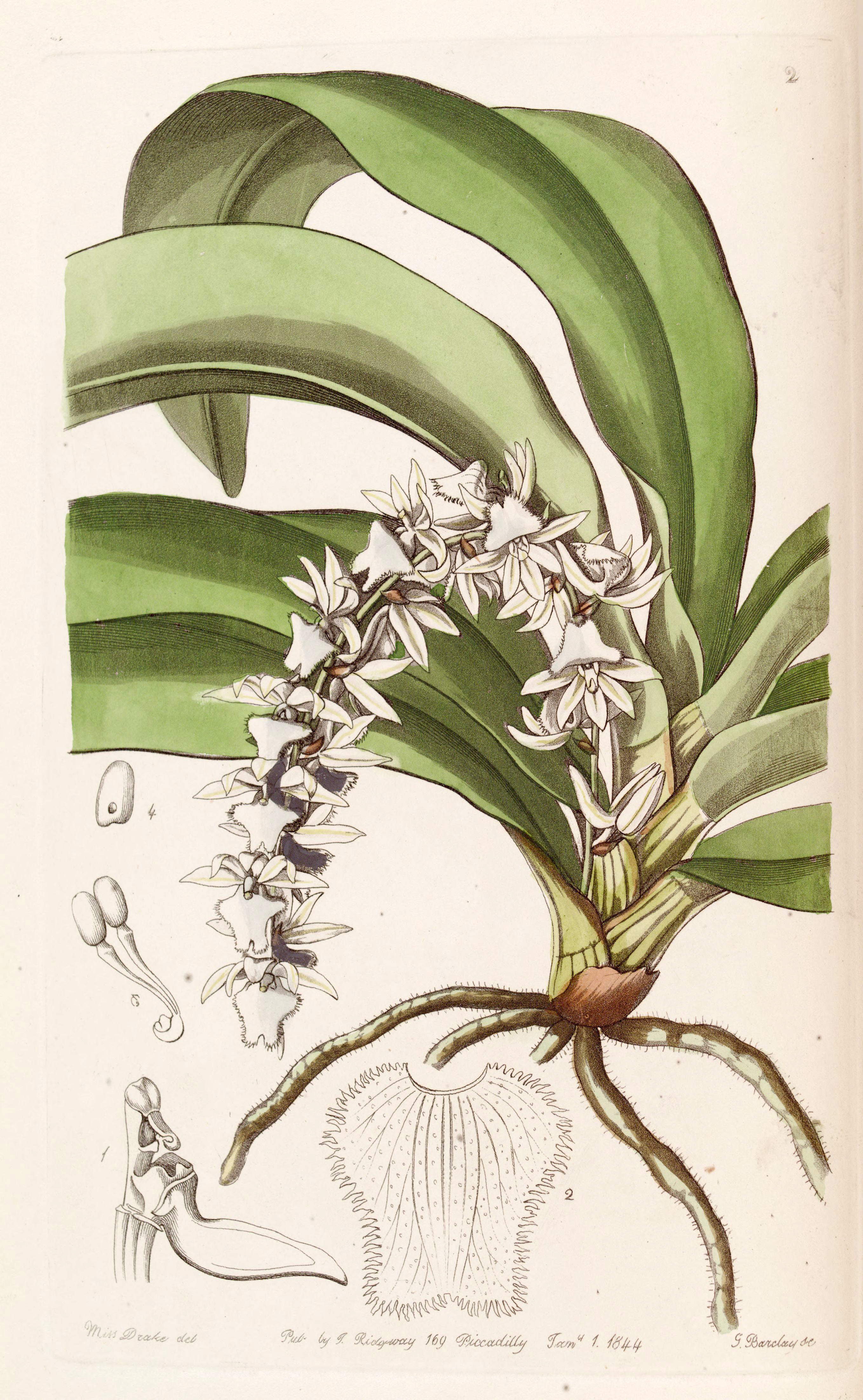 Diaphananthe pellucida (as syn. Angraecum pellucidum)